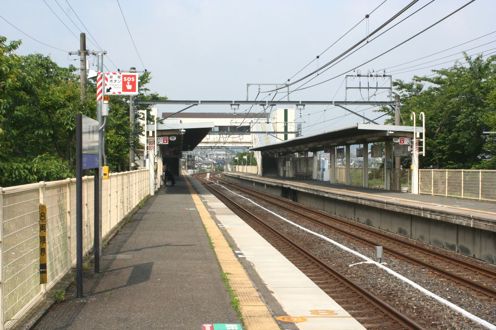 馬堀駅ホーム